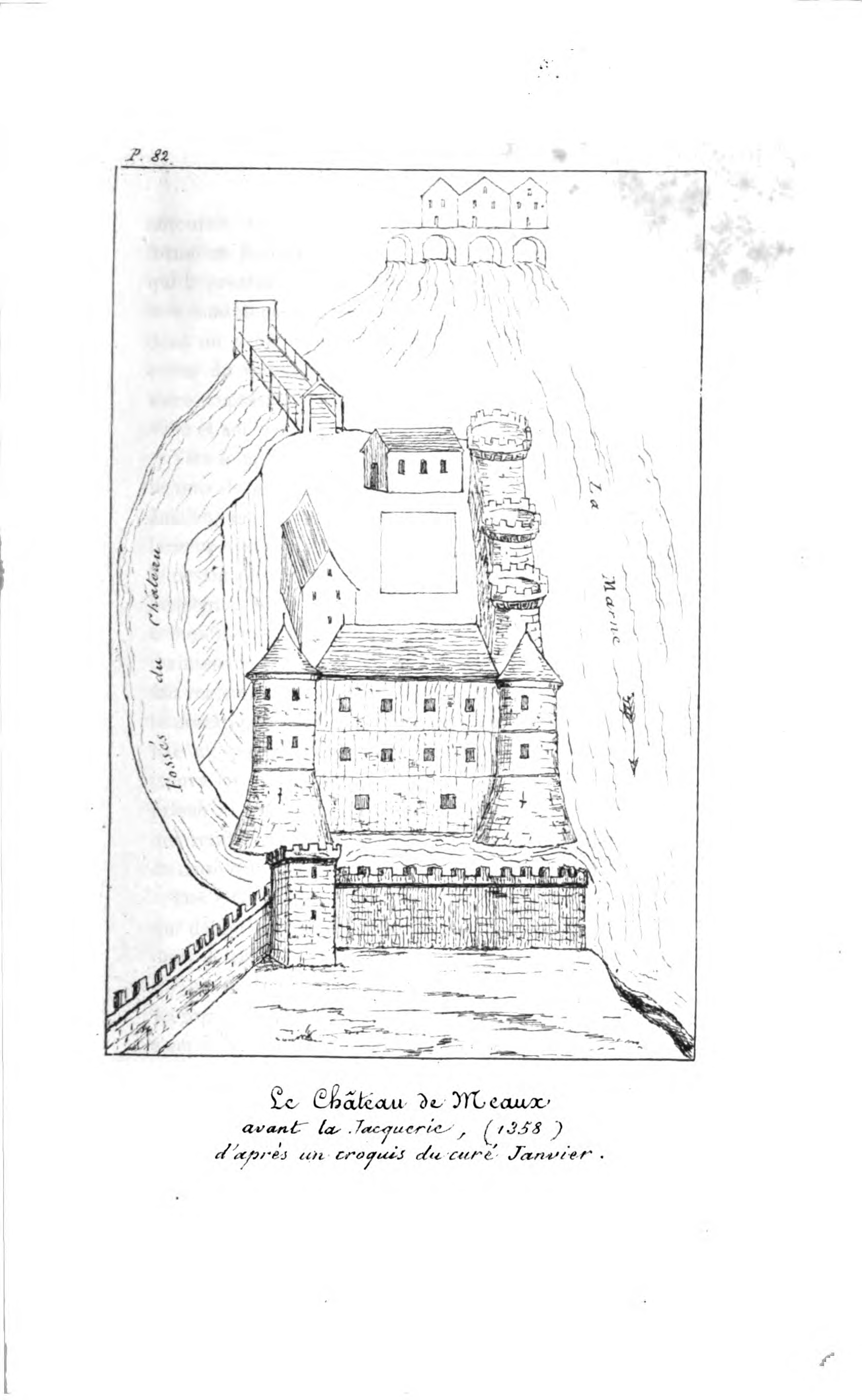 dessin du château de Meaux avant la jacquerie (1358).